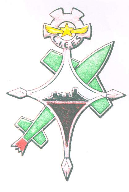 L' écuisson porté par les ouvriers du CIEES (Centre Interarmées d'Essai d'Engins Spéciaux)